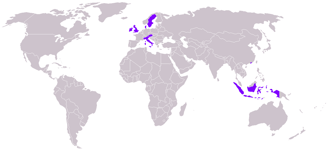 Paesi in cui opera 3